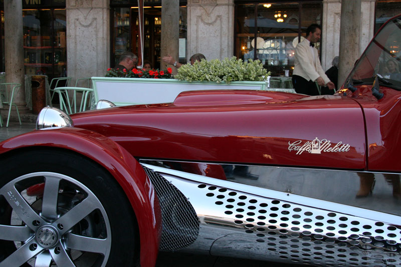 Twister firmata "Caffè Meletti"- Ascoli Piceno, Italia.